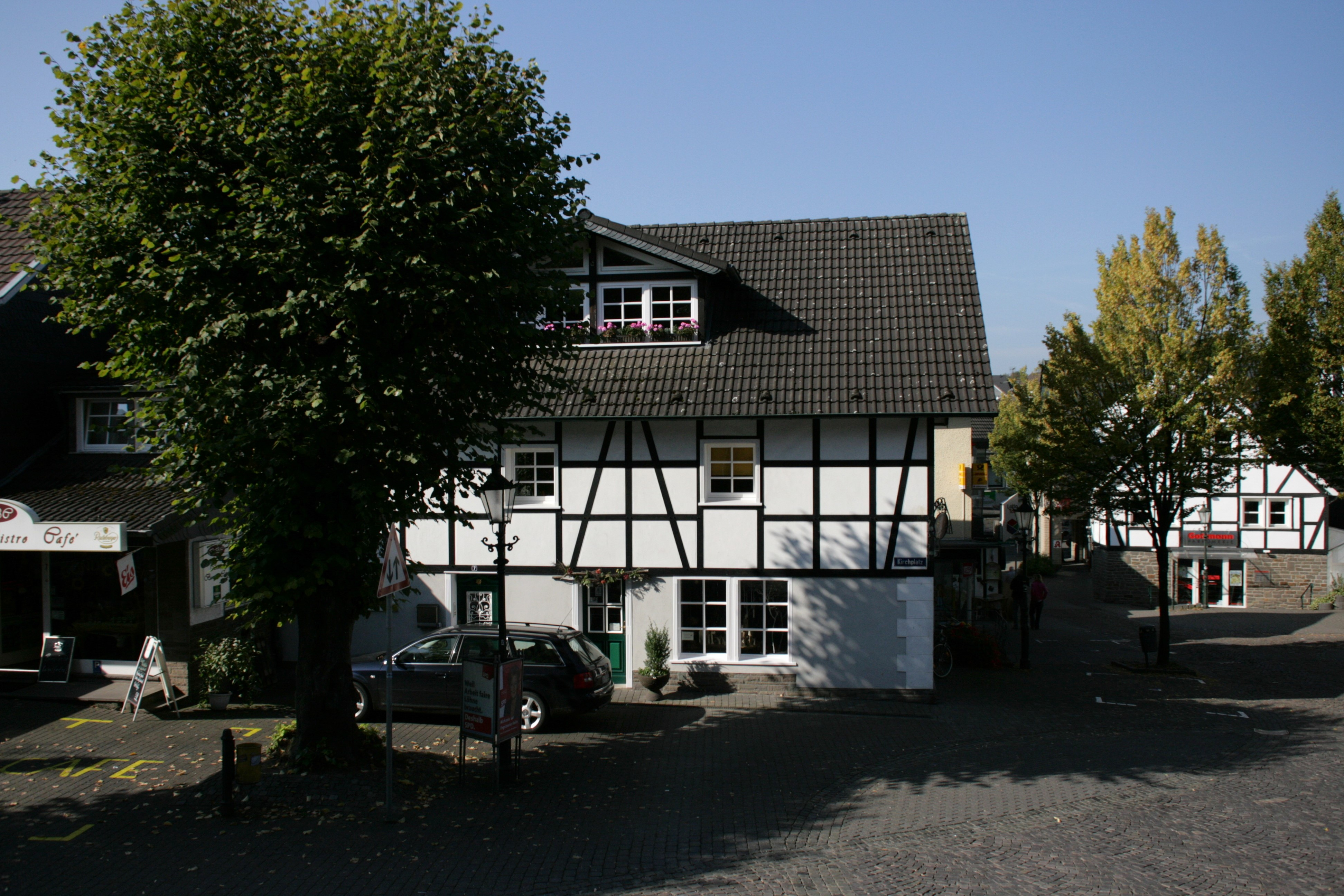 Kirchplatz in Lindlar, Ecke Hauptstraße